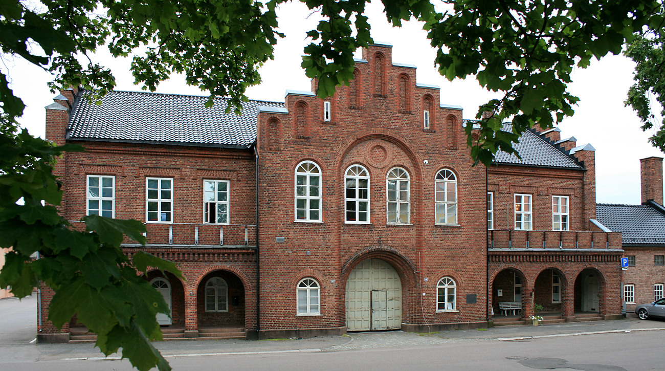 Vaktstue, Karljohansvern, Horten.